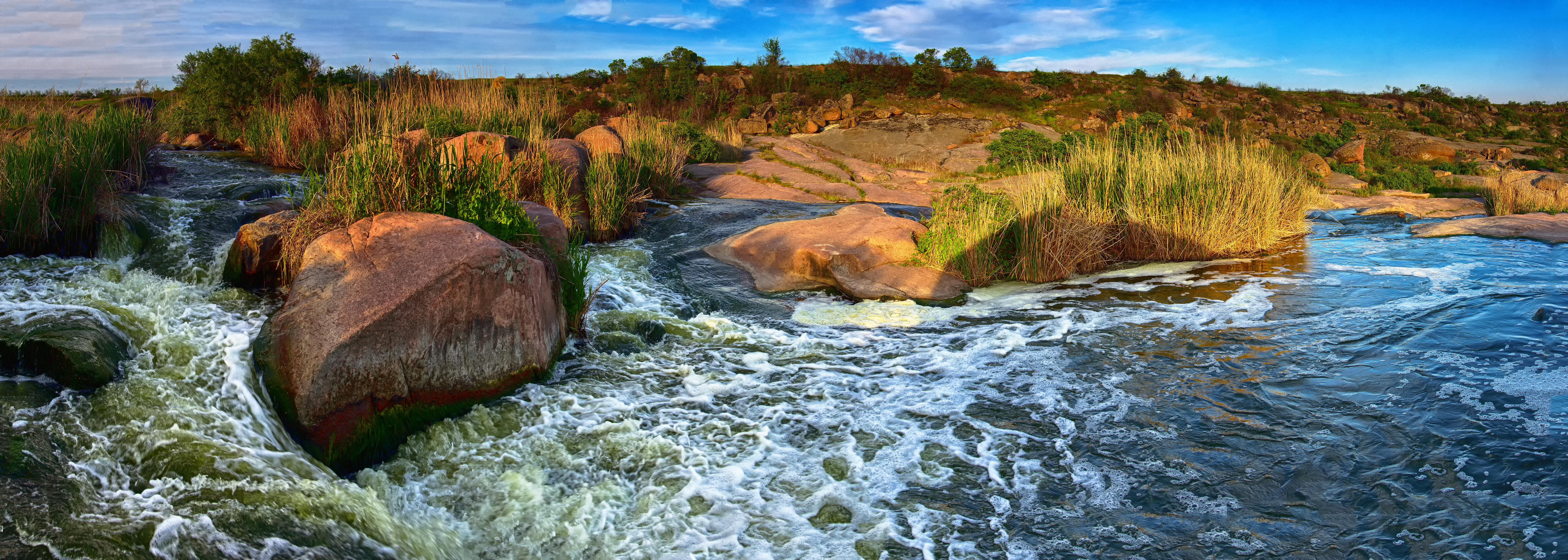 Кам'янський прибережно-річковий комплекс, Апостолівський р-н, Михайлівка, Кам'янка, Токівське, Ленінське